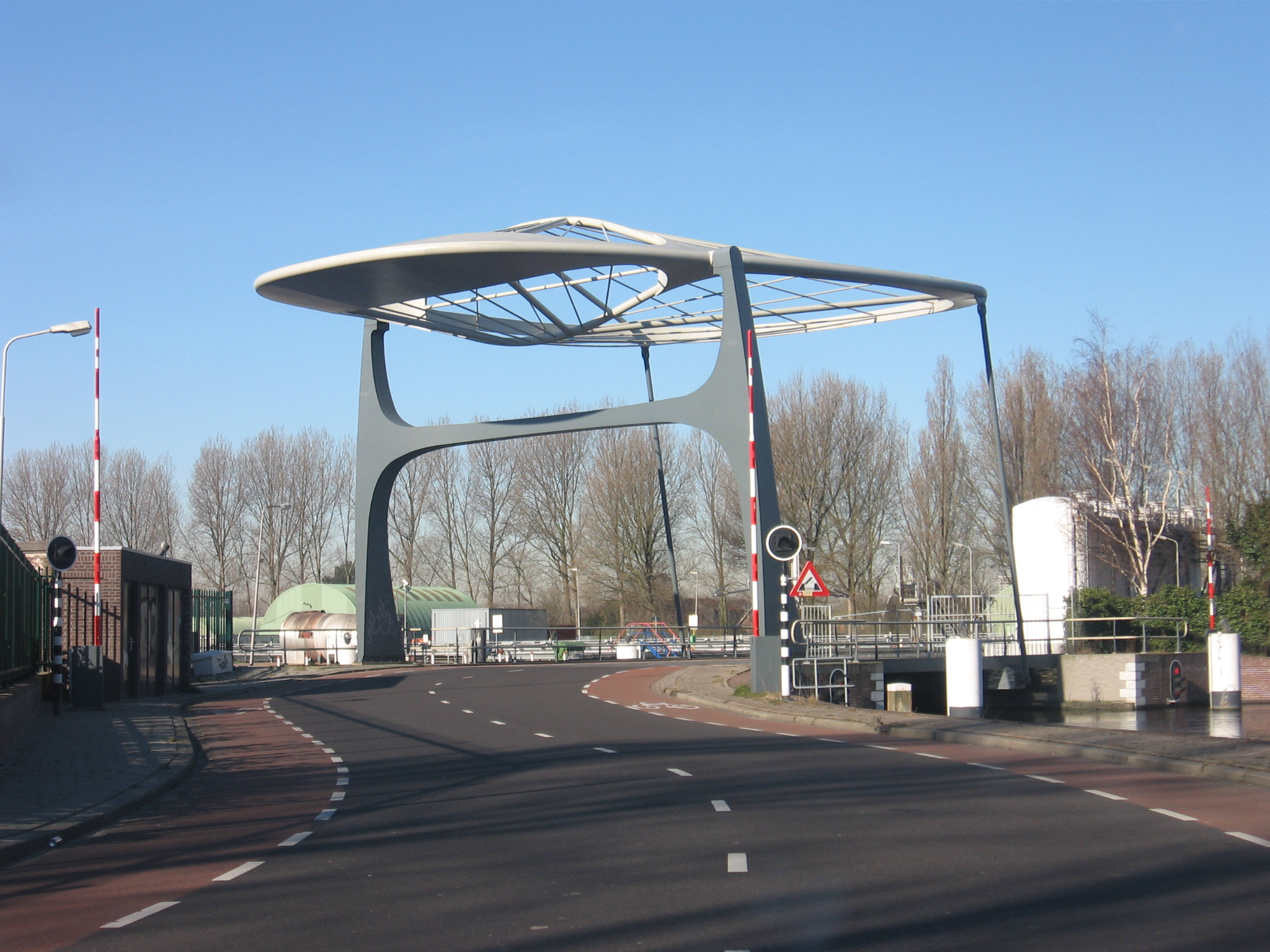 kolenhavenbrug Delft